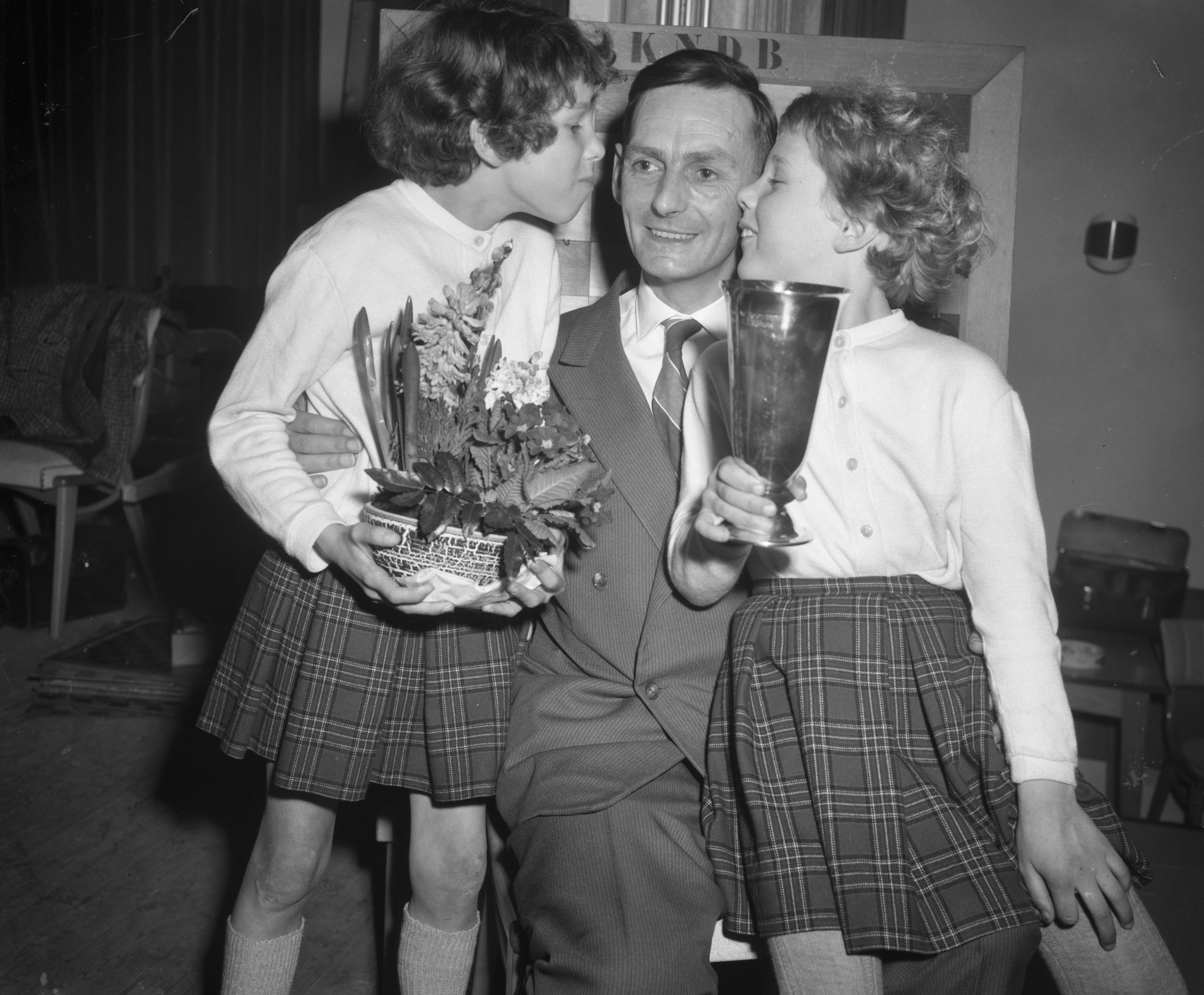 Collectie / Archief : Fotocollectie Anefo Reportage / Serie : [ onbekend ] Beschrijving : Laatste wedstrijd om het pers damkampioenschap te Utrecht De Jong wordt door zijn dochters gefeliciteerd Datum : 5 maart 1960 Locatie : Utrecht Trefwoorden : PERS, damkampioenschappen, dochters, wedstrijden Fotograaf : Behrens, Herbert / Anefo Auteursrechthebbende : Nationaal Archief Materiaalsoort : Negatief (zwart/wit) Nummer archiefinventaris : bekijk toegang 2.24.01.04 Bestanddeelnummer : 911-0700